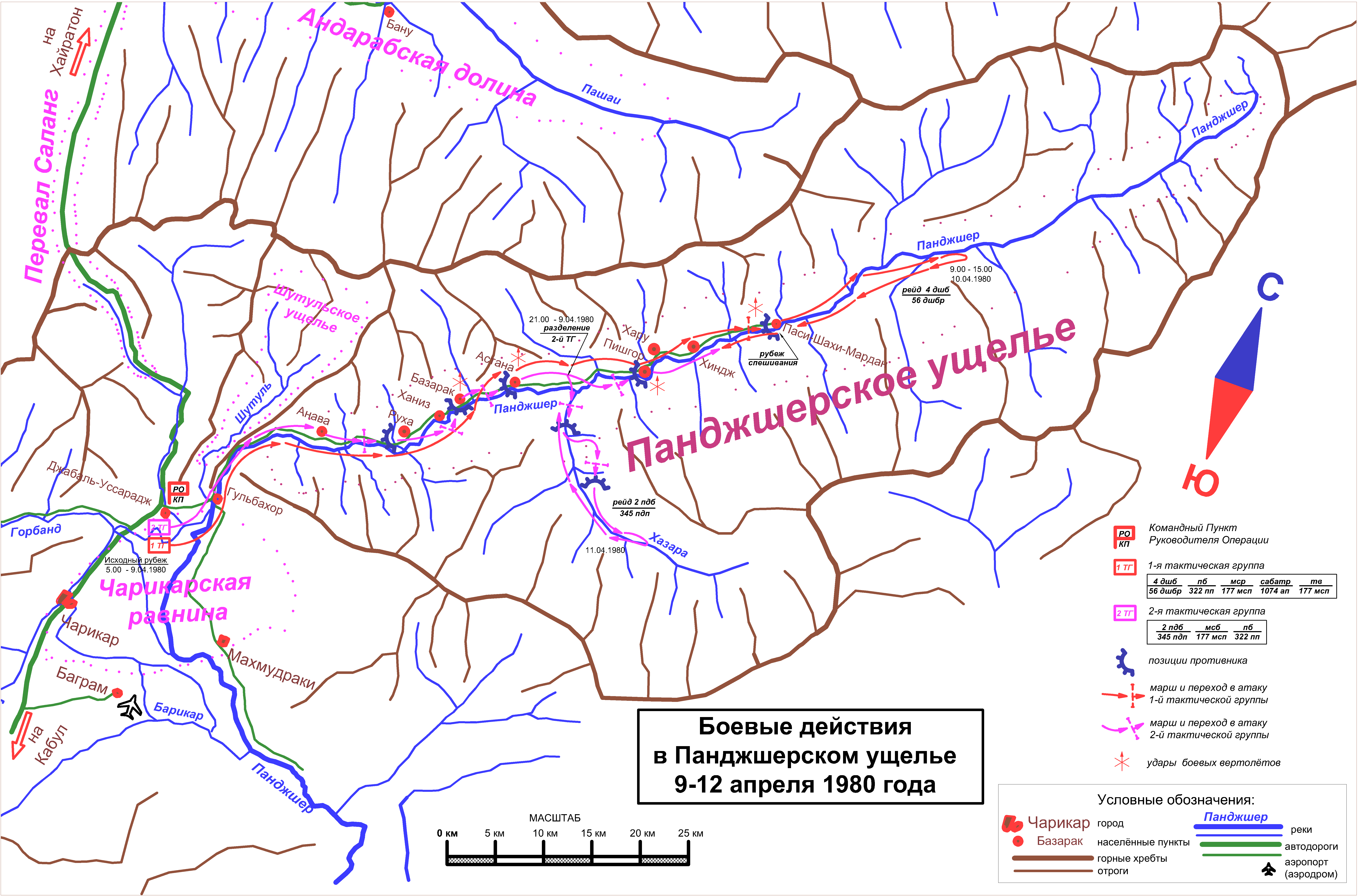 Боевые действия в Панджшерском ущелье 9-12 апреля 1980 года. Собственная работа. Отчерчено в AutoCAD.